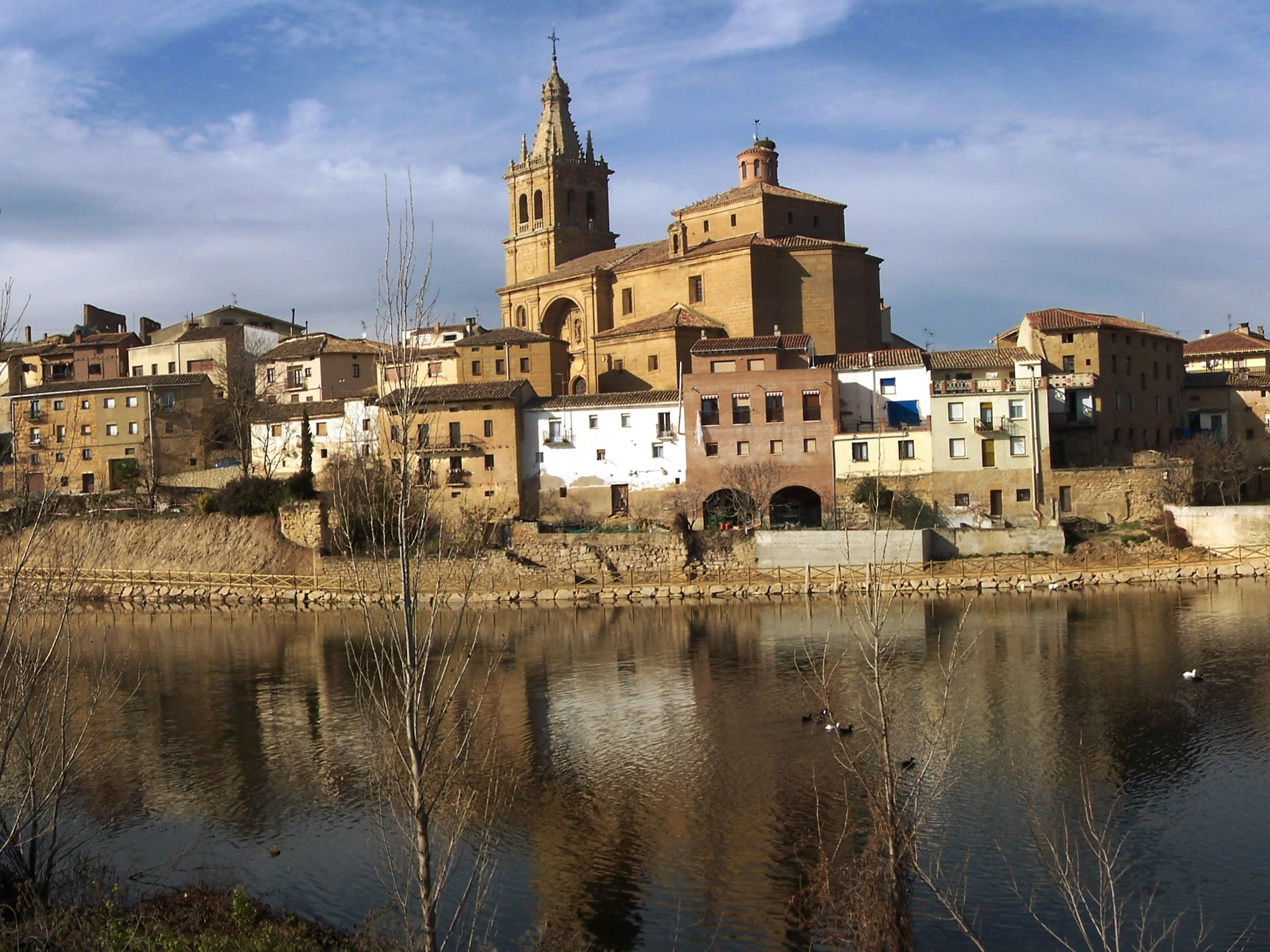 El río Ebro por Briñas donde se puede ver su paseo sobre la misma orilla.